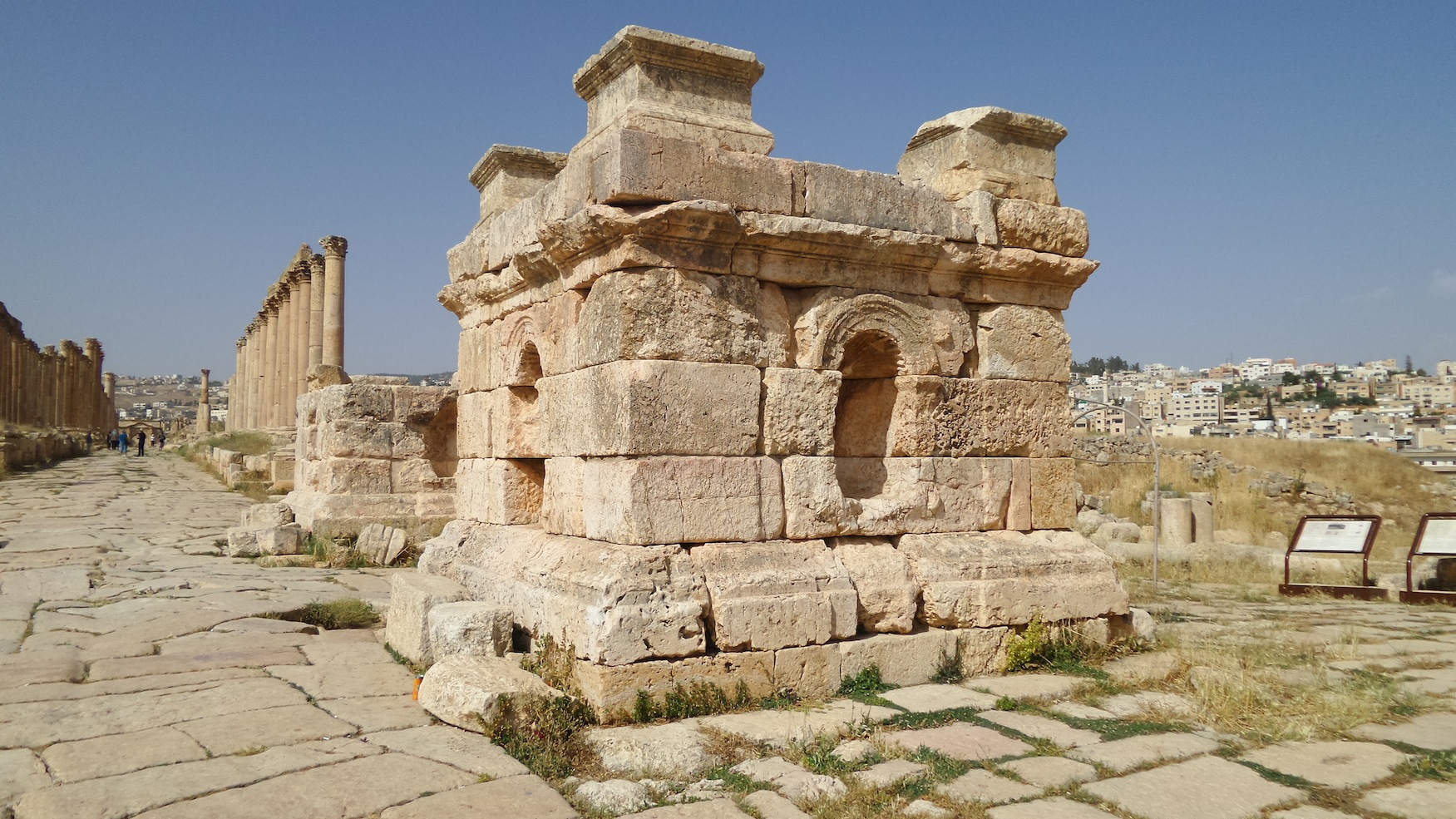 Jerash, Jordan